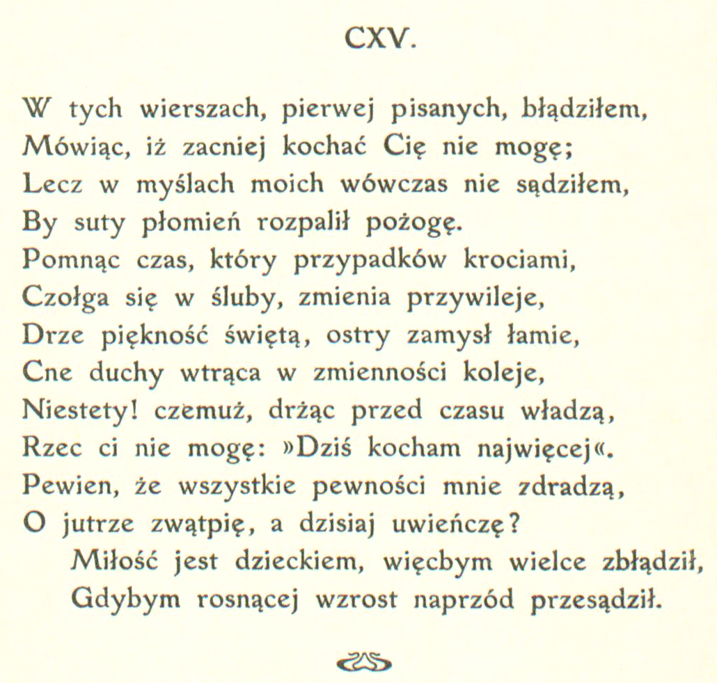 Sonety Shakespeare'a I-CXXXIV i CXXXVII-CLIV tłumaczenie Maria Sułkowska (MUS) sonet 115 strona 129